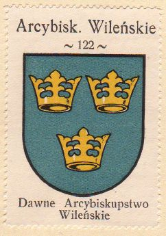 Herb Arcybiskupstwa Wileńskiego